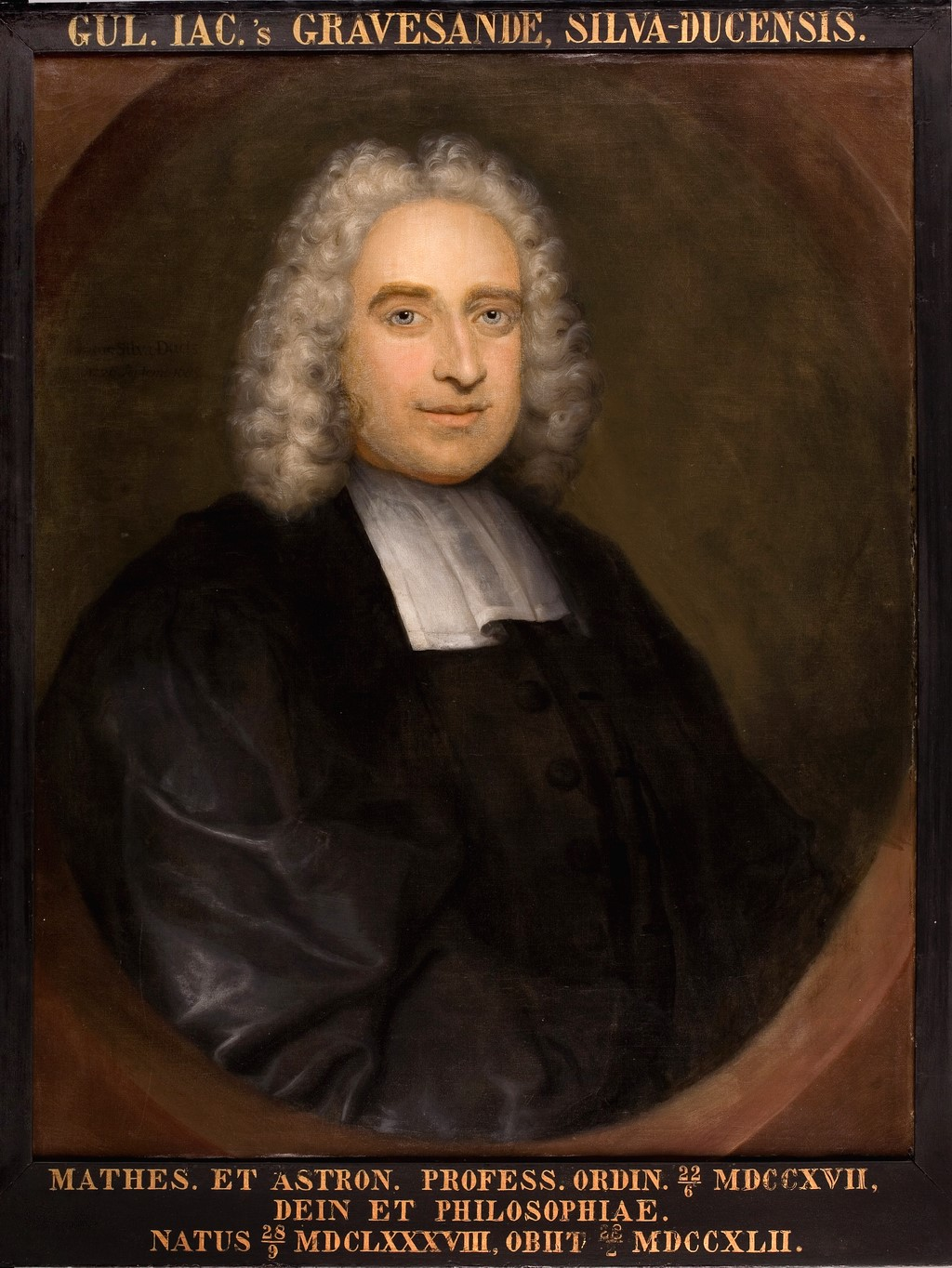 Portret van Willem Jacob 's Gravesande (1688-1745), hoogleraar Sterrenkunde, Wiskunde en Wijsbegeerte te Leiden. Portrait by Hendrik van Limborch (1681-1759). Icones Leidenses 145